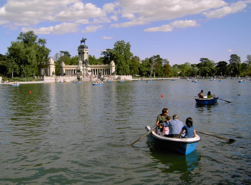 Retiro Park